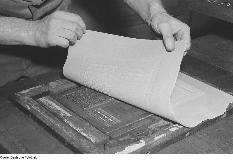 Original image description from the Deutsche Fotothek Herstellen einer Mater (Stereotypie)